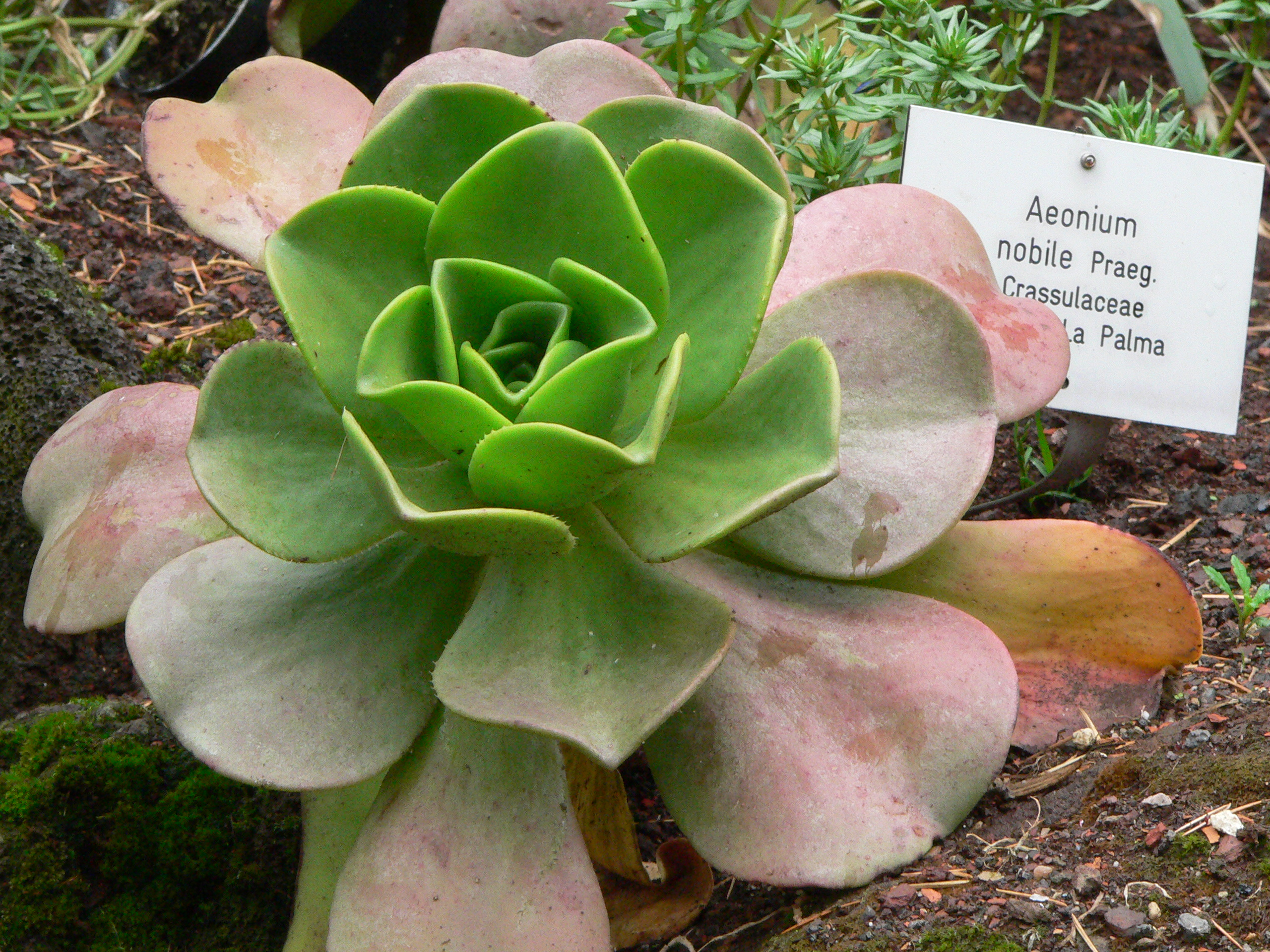 Aeonium nobile Praeg.